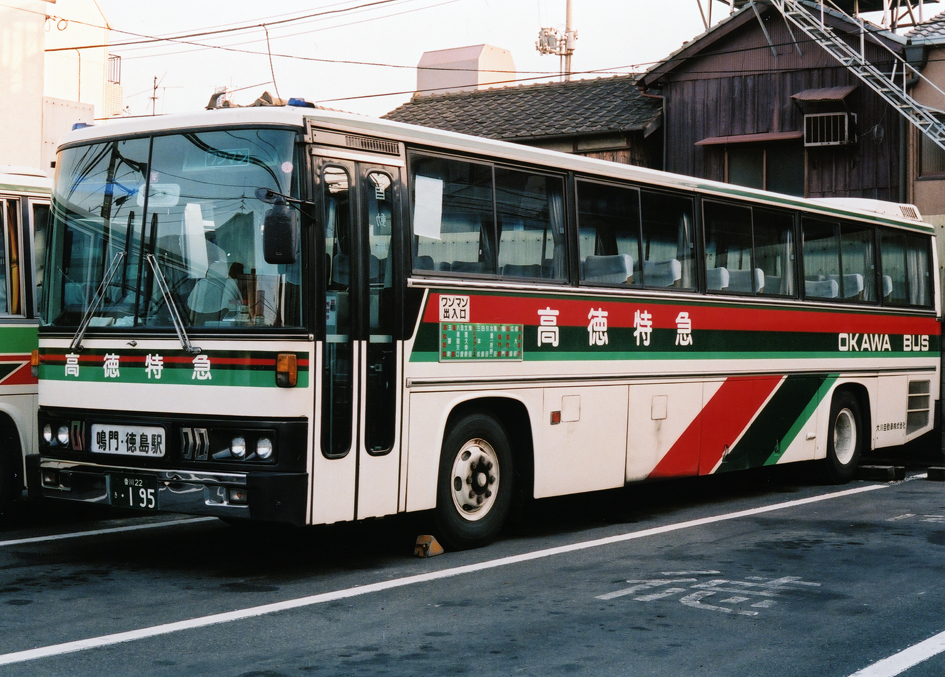 大川自動車 日野・スケルトン K-RS360P 高徳特急